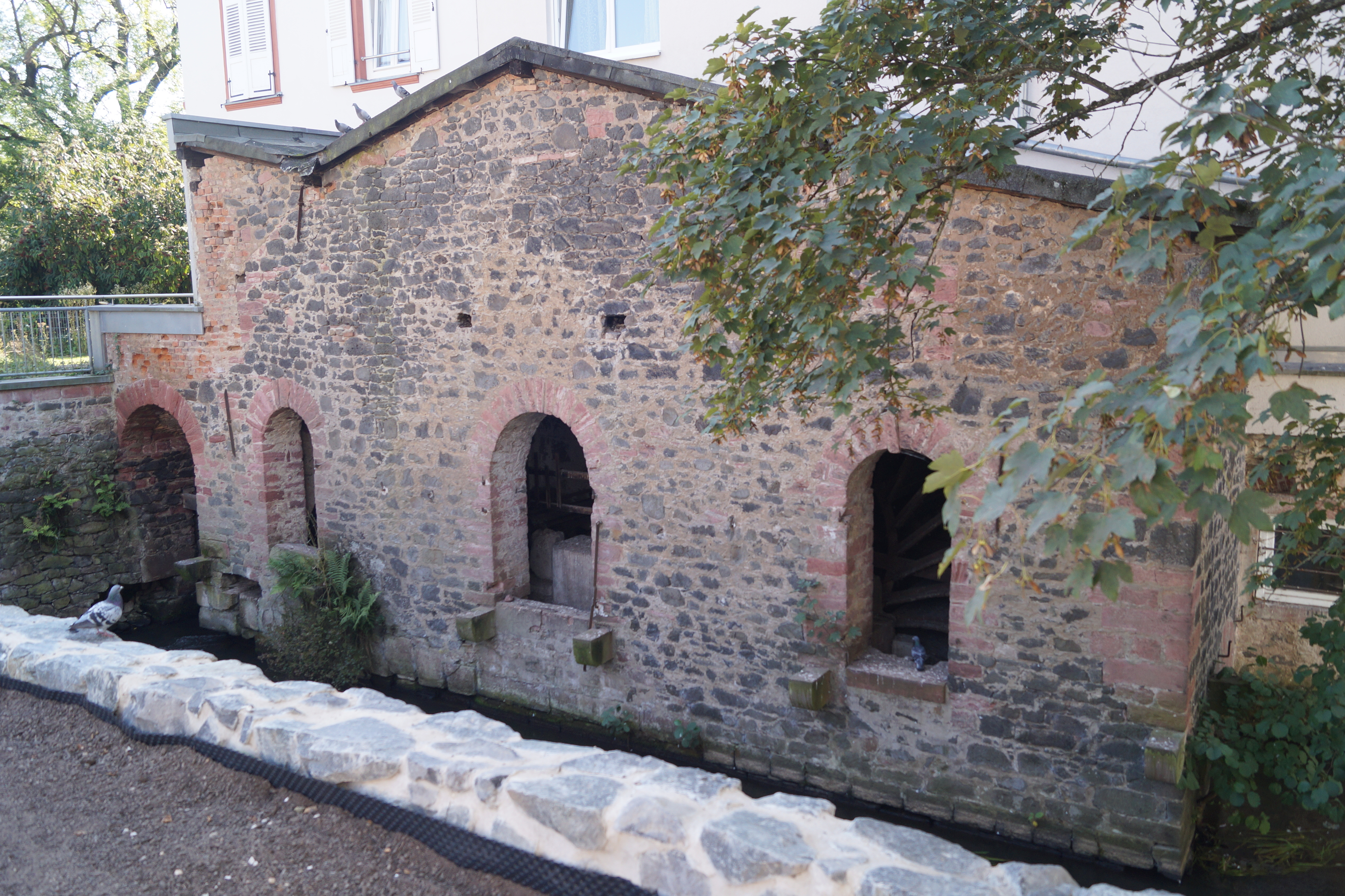 Baurest der Sandelmühle in Hanau